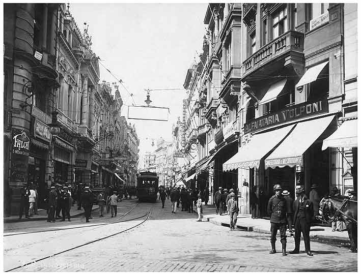 Rua 15 de Novembro, em direção à praça da Sé, tomada da praça Antonio Prado. Uma das principais vias públicas da cidade, onde se achavam luxuosos comércios, os mais elegantes pontos de encontro além de grande número de estabelecimentos bancários e profissionais, formava com as ruas Direita e São Bento o chamado "triângulo", região de grande concentração de lazer e negócios.